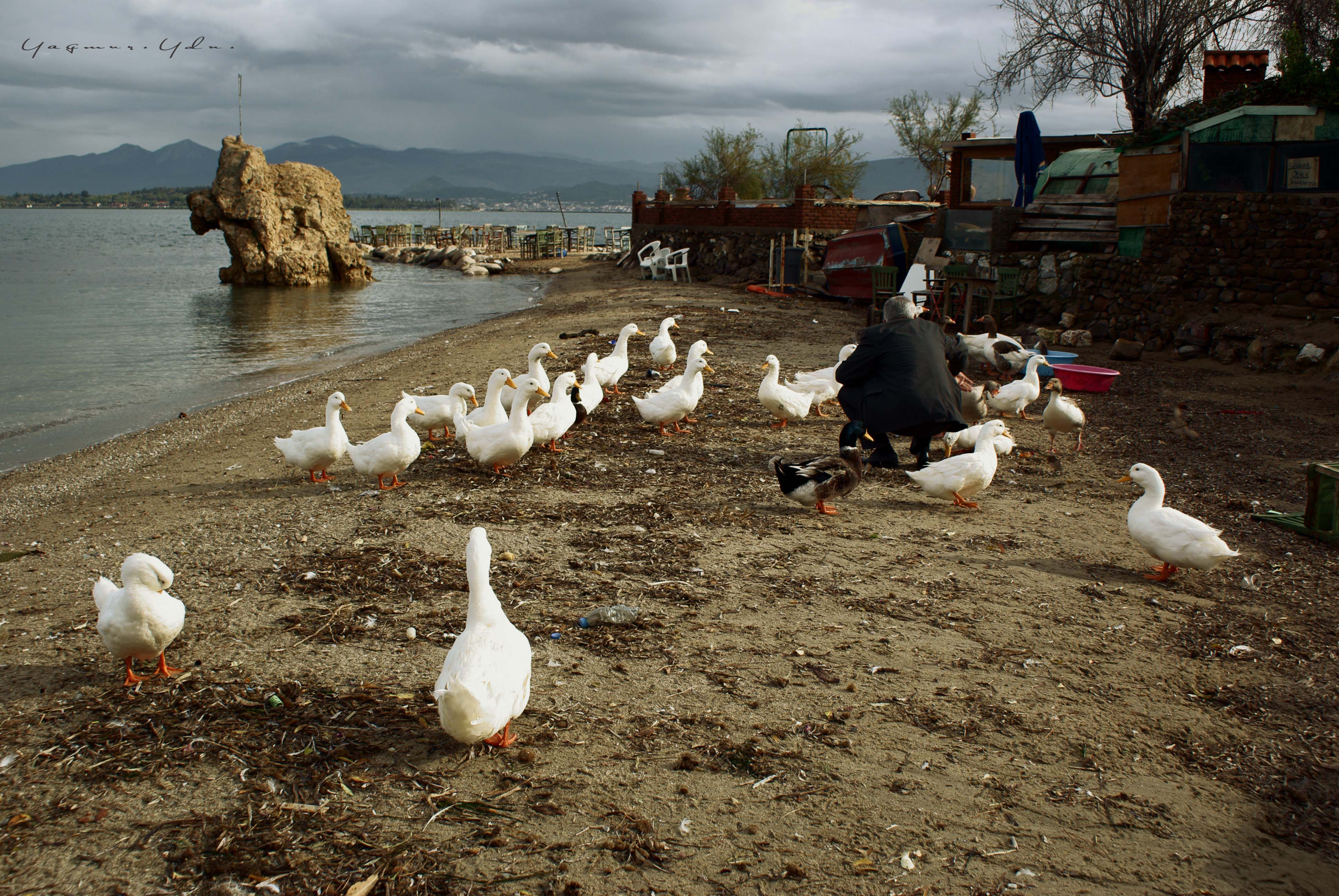 feeding time / ceşmealtı